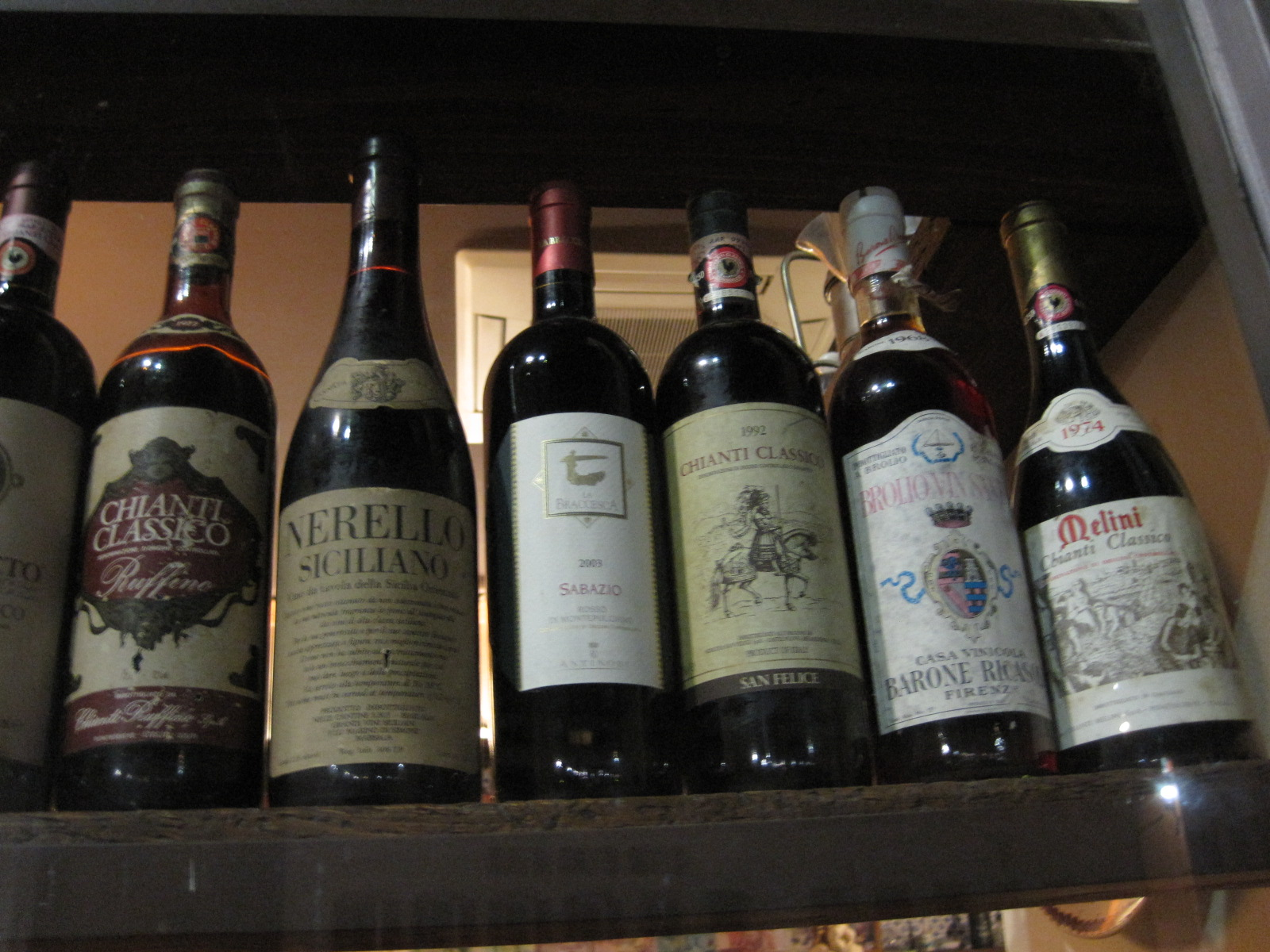 Chianti (wine)